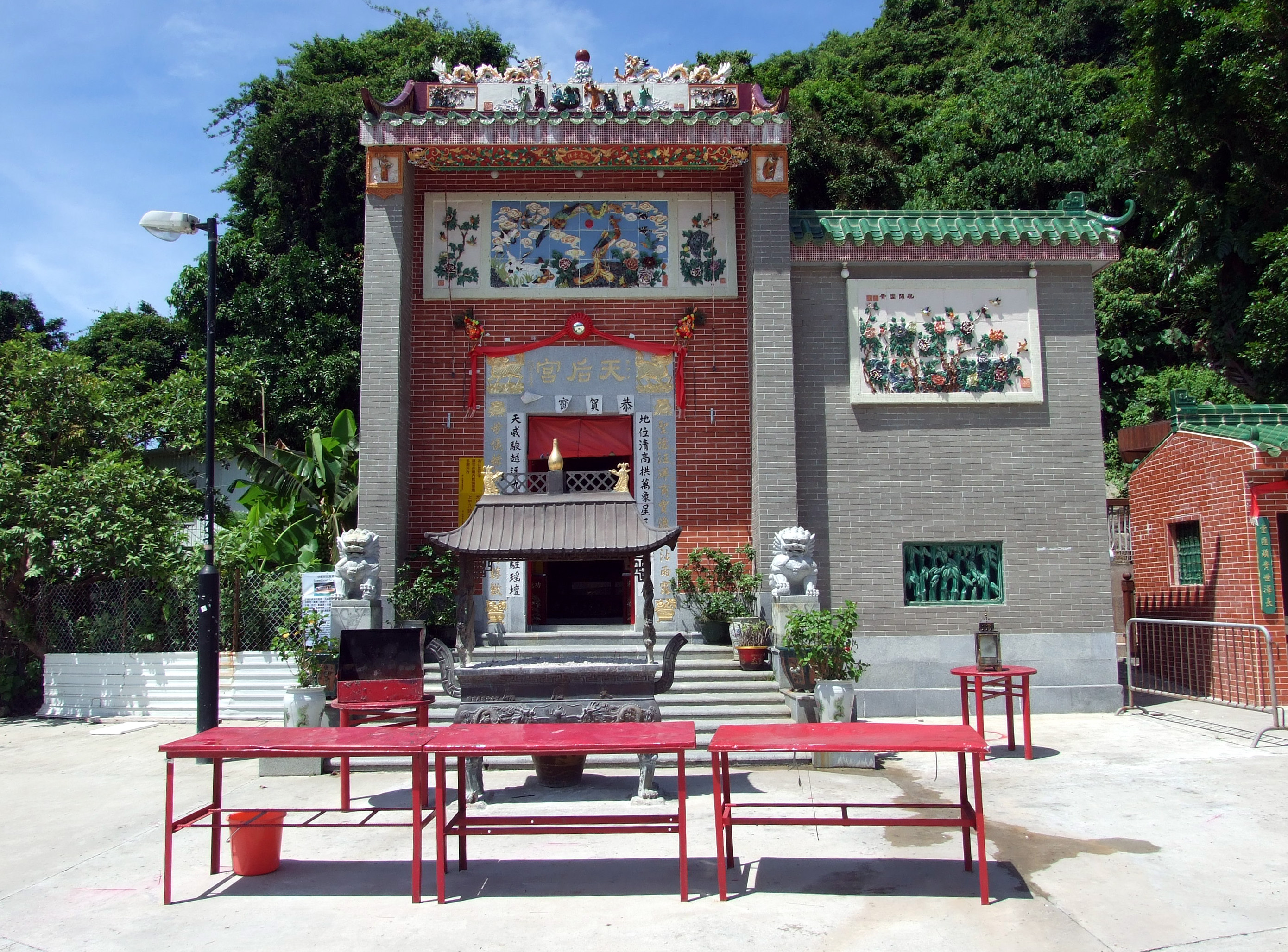 中文（香港）: 索罟灣天后宮